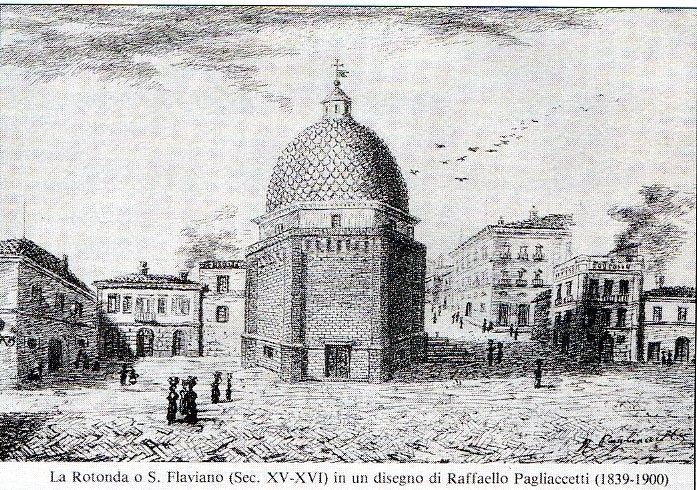 Piazza della Rotonda col Duomo di Giulianova in un disegno ottocentesco di Raffaello Pagliaccetti presso la Pinacoteca Civica.